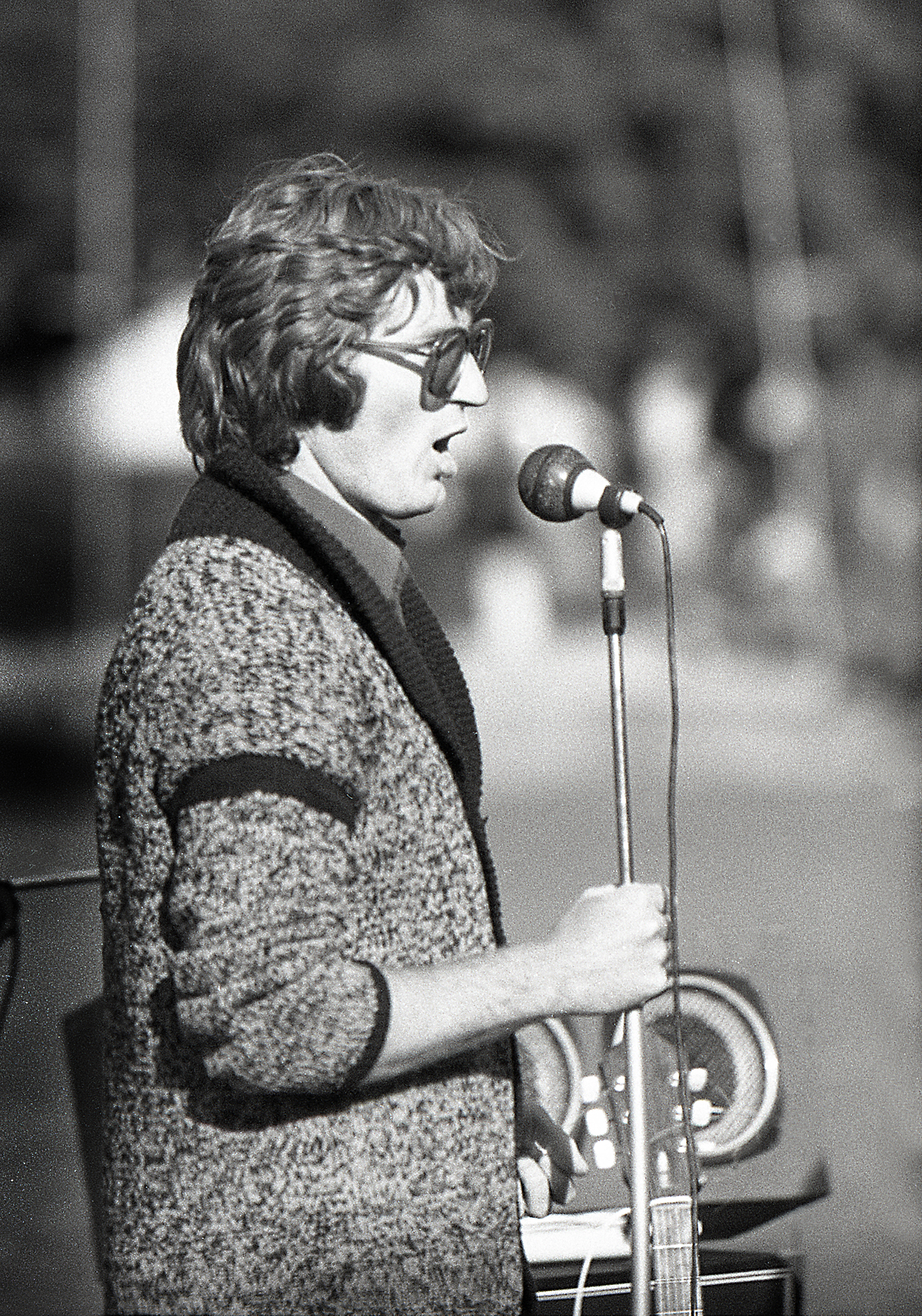 Uno Kaupmees